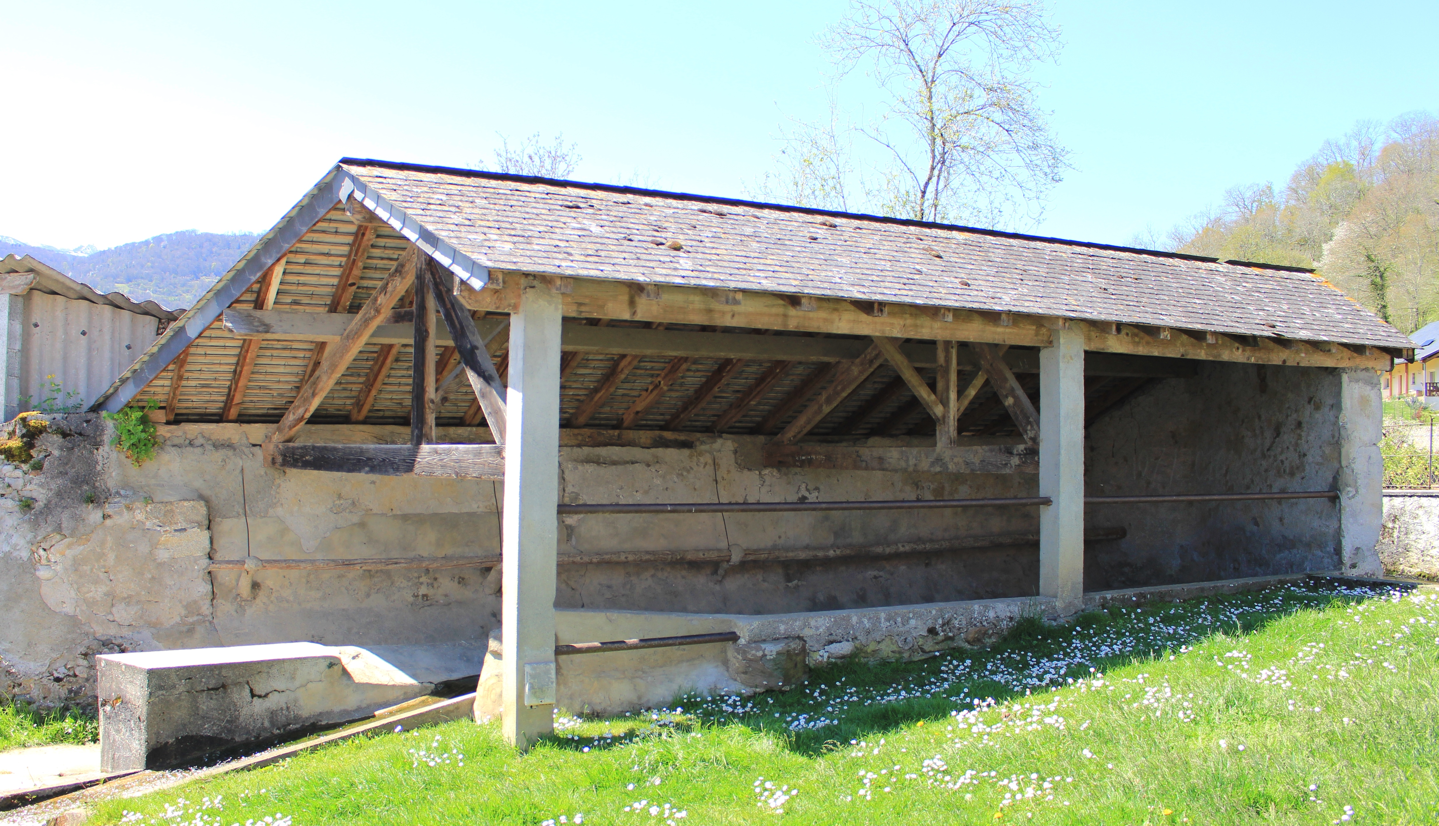 Lavoir de Peyrouse (Hautes-Pyrénées)